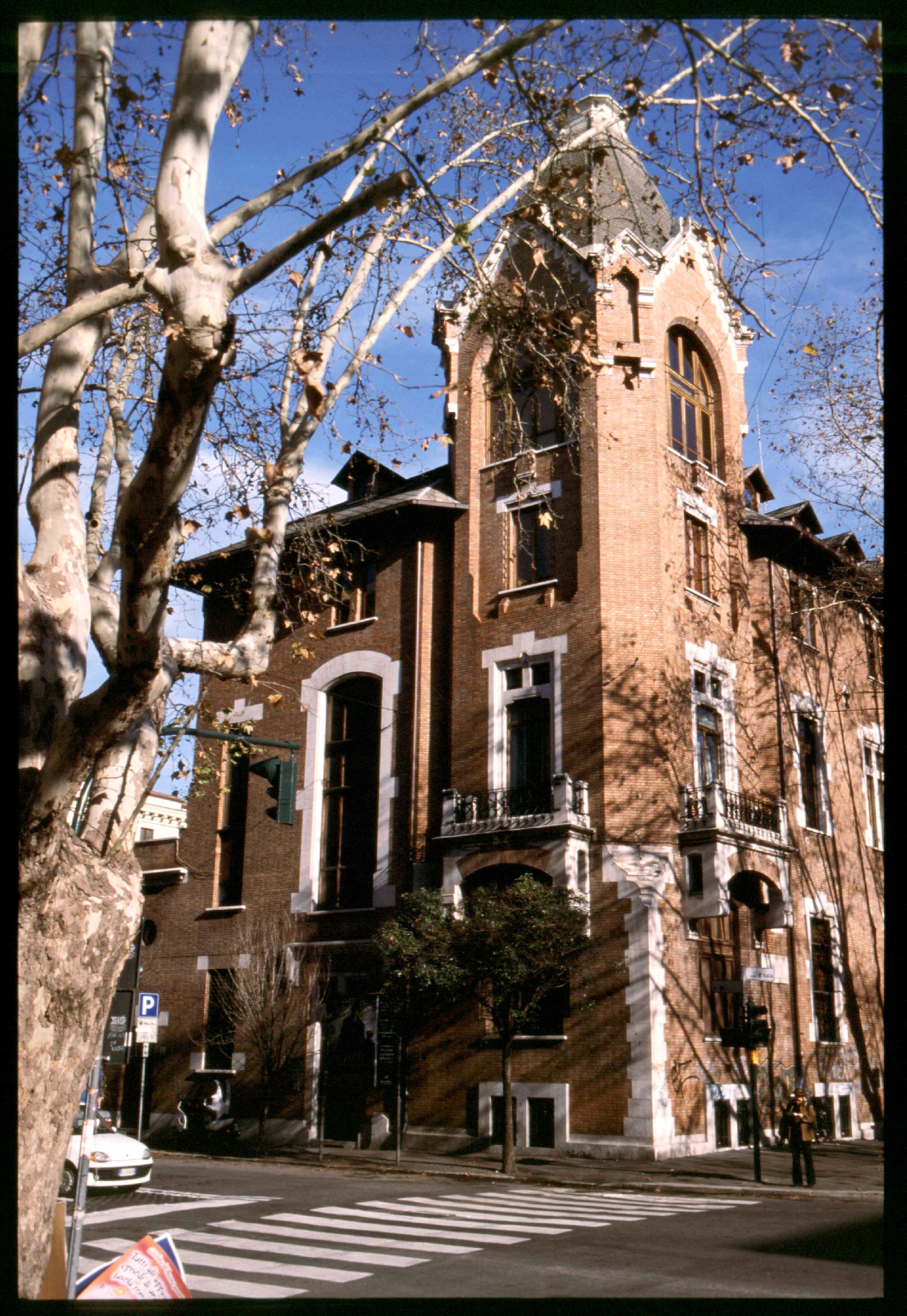 fotografia della Villa Marignoli